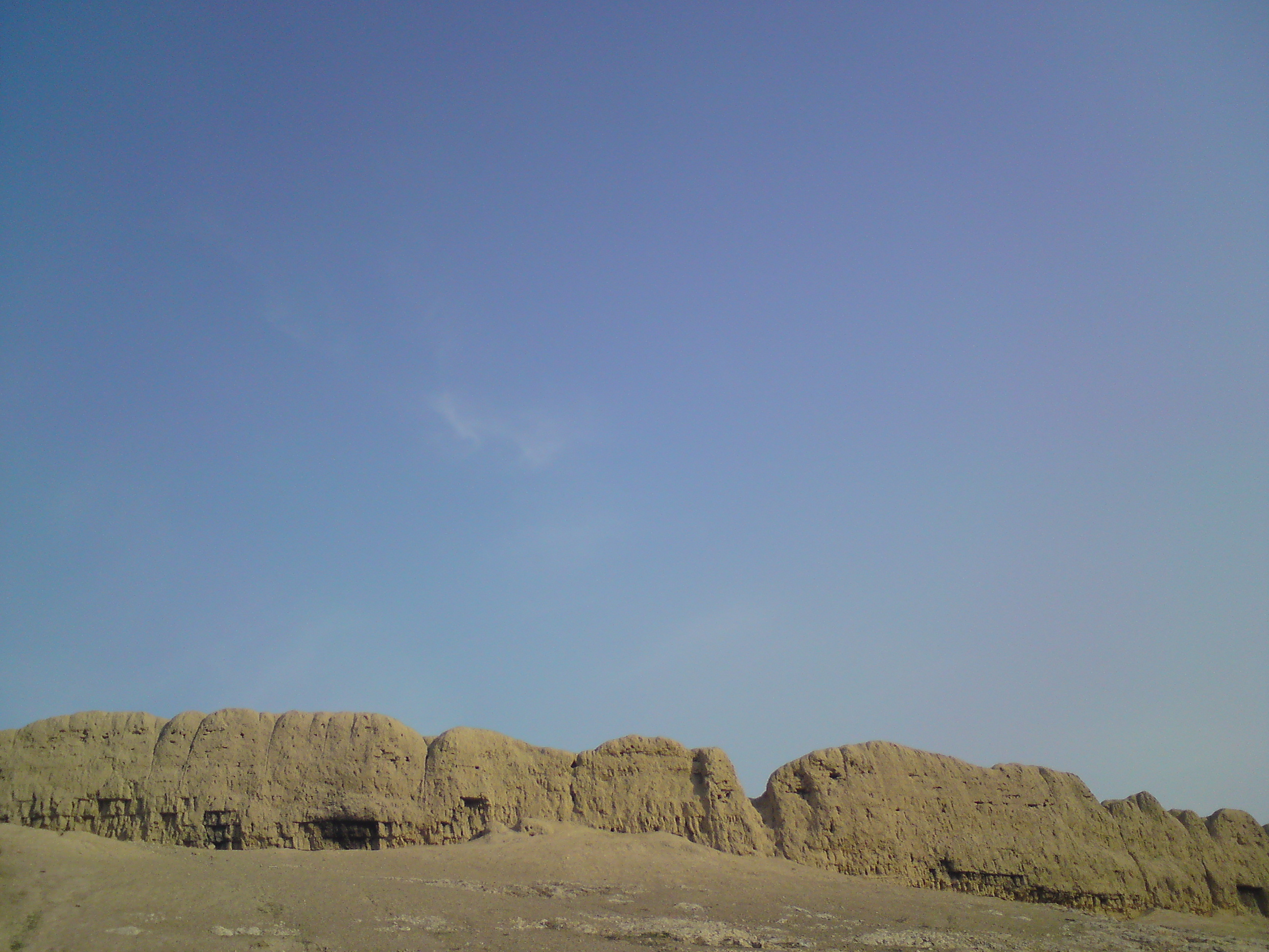 قسمت به جا مانده از دیوار (۲)